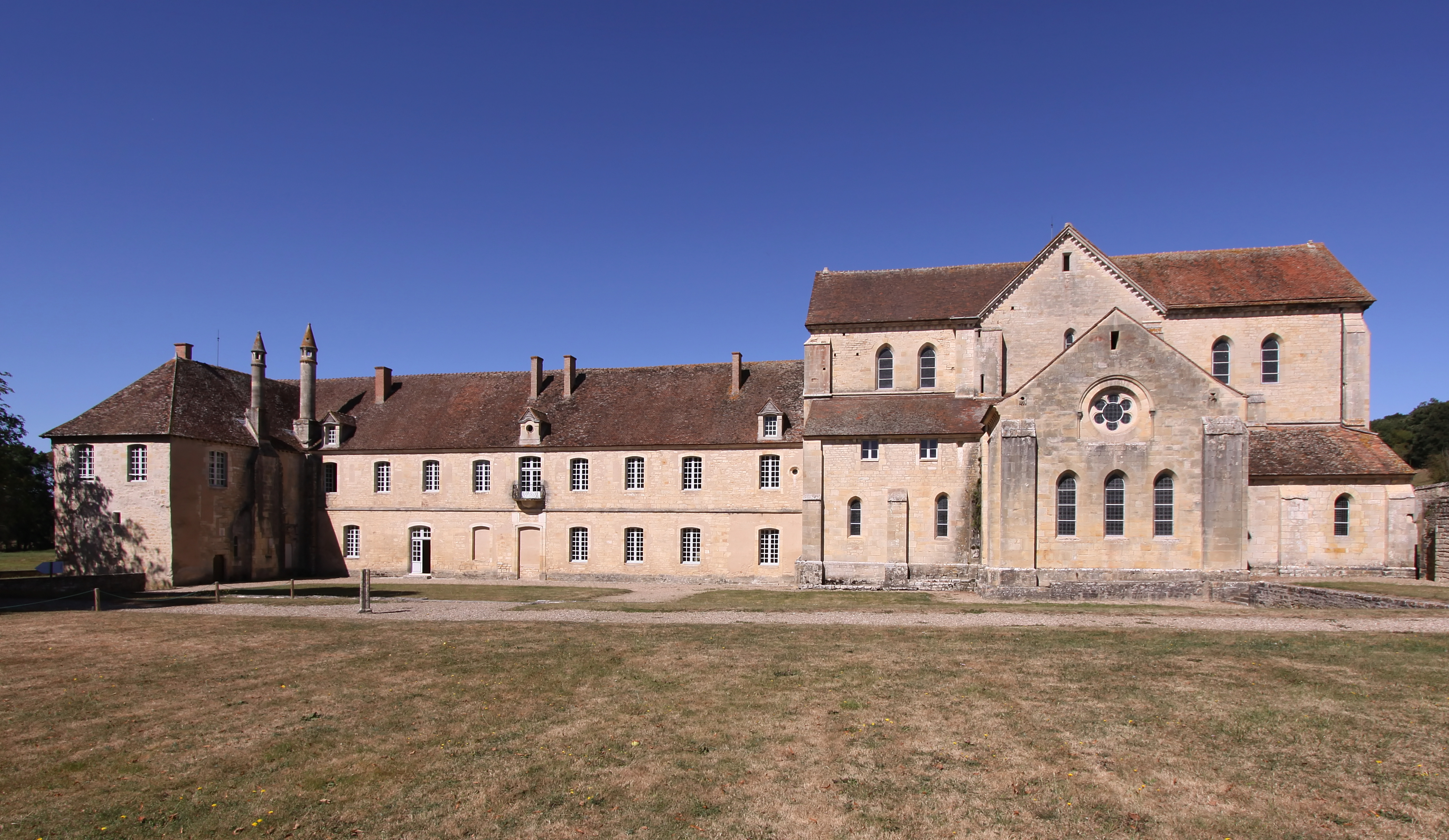 Zisterzienserklosters Noirlac im französischen Département Cher - Ostseite